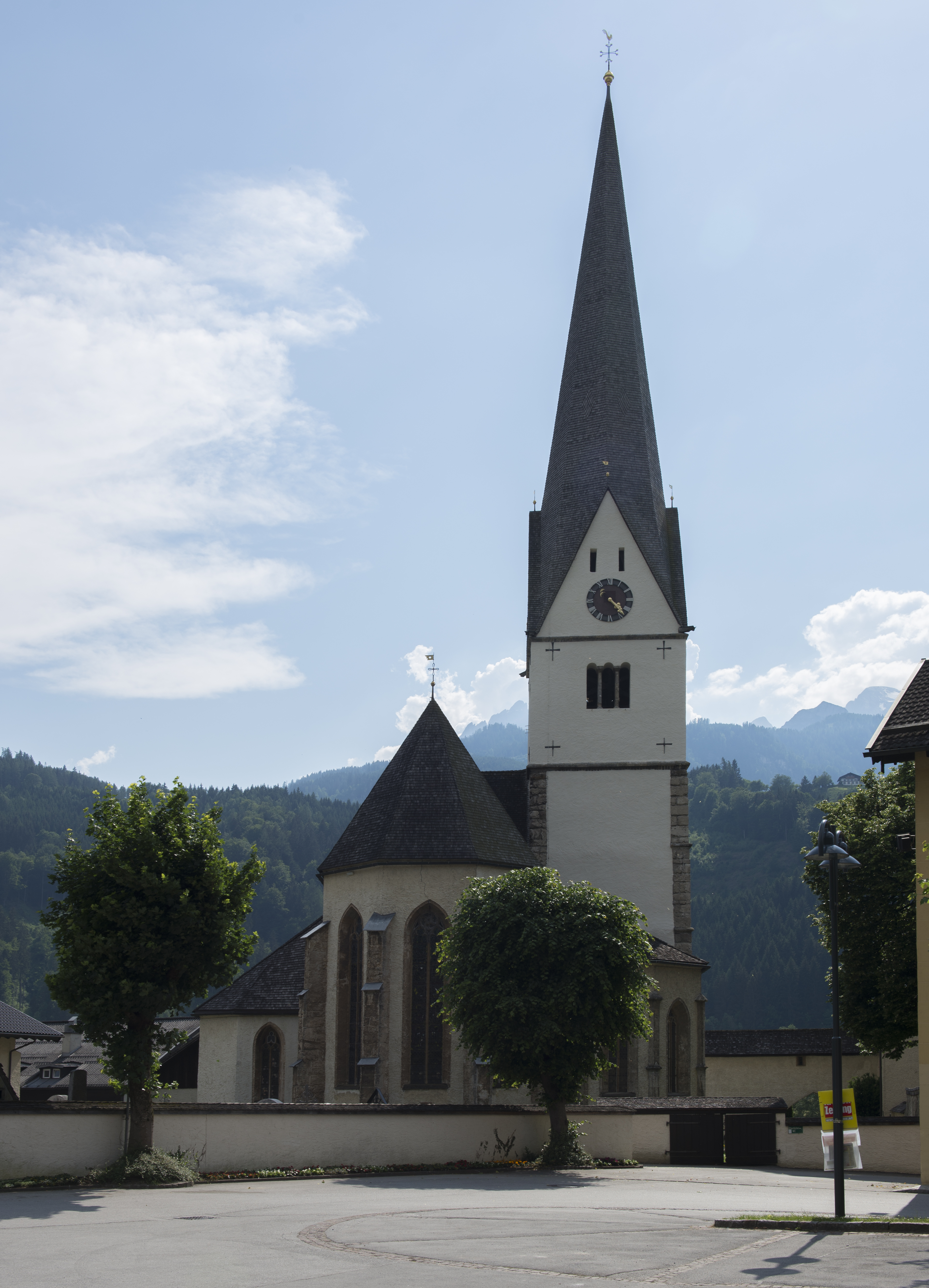 Kath. Pfarrkirche hl. Cyriak